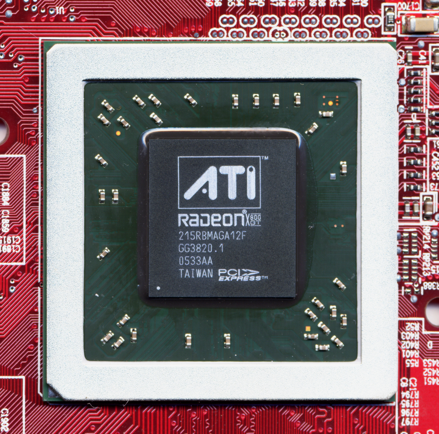 ATi RADEON X800GT SAPPHIRE製 Radeon X800GT 256MB に搭載